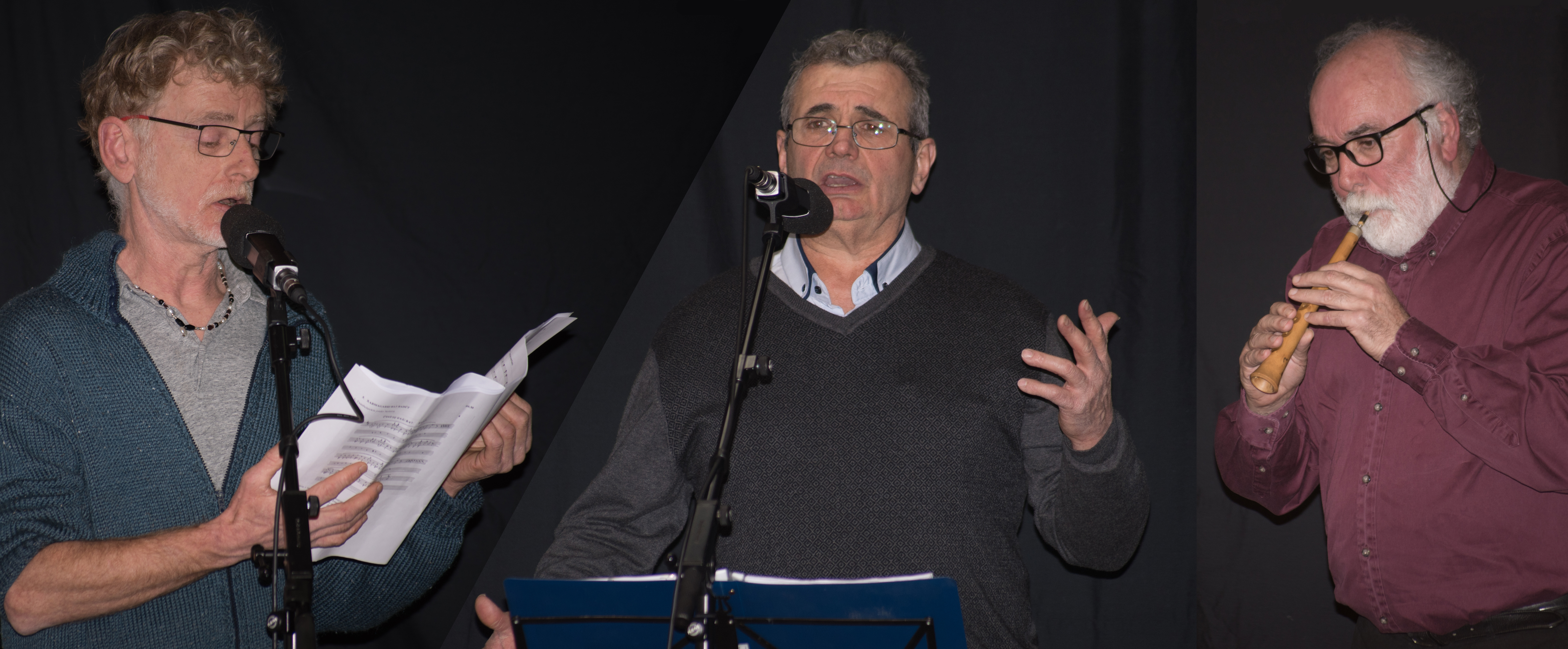 Kontzertuaren lehen zatian Titika Rekalt, Jean Mixel Bedaxagar eta Juan Mari Beltranek Pierre Caubeten grabazioetan oinarrituta hura omentzeko prestatu zuten emanaldia entzuteko aukera izan zen.